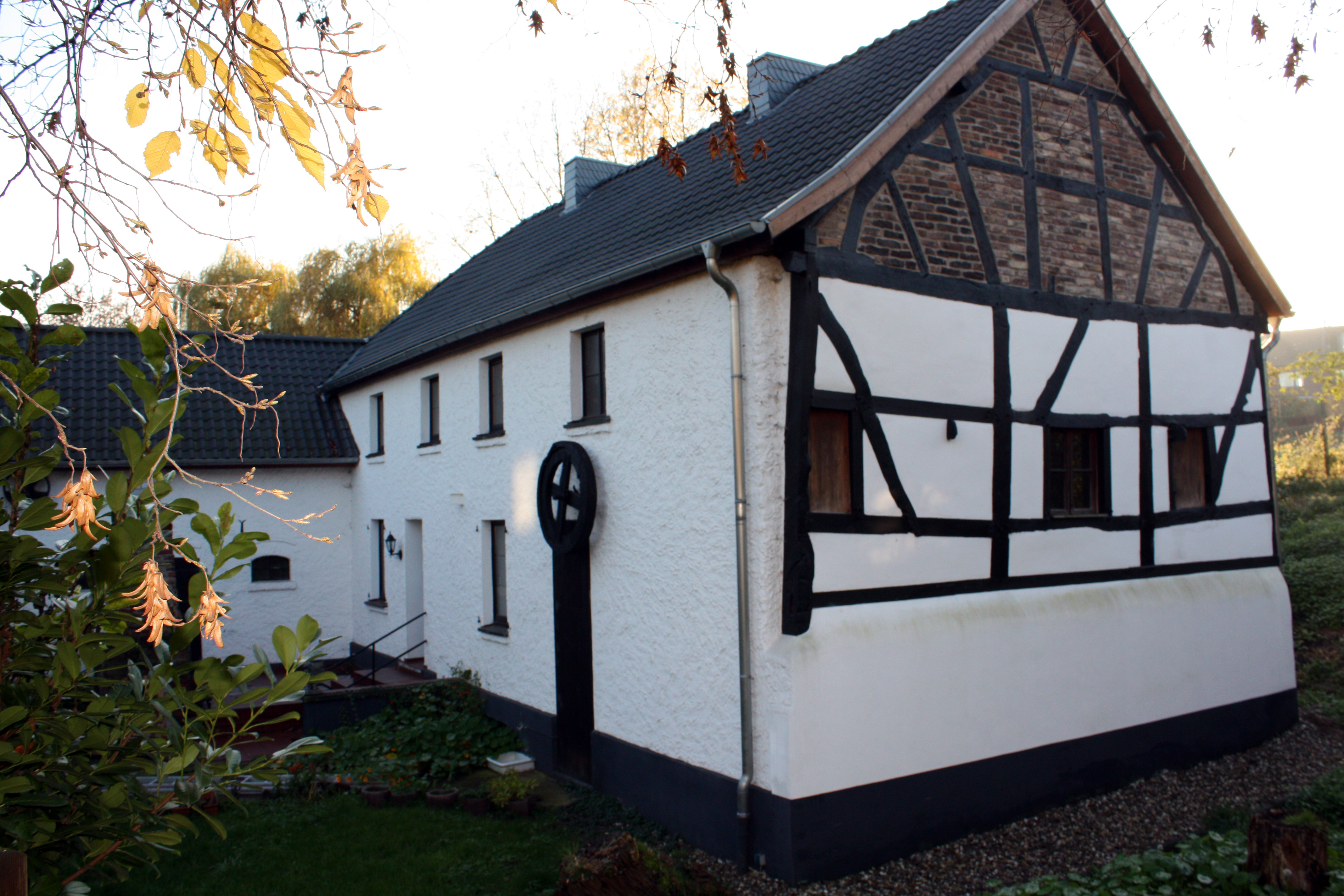 Hürth, Alstädten-Burbach. Ehemalige Burbacher Mühle